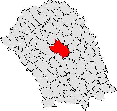 Categorie:Hărţi ale judeţului Botoşani